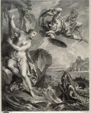 Andromène délivrée par Persée